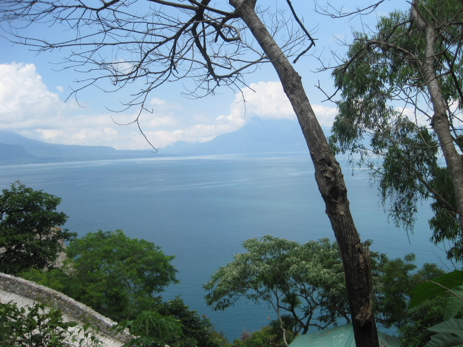 Imatge del llac d'Atitlán